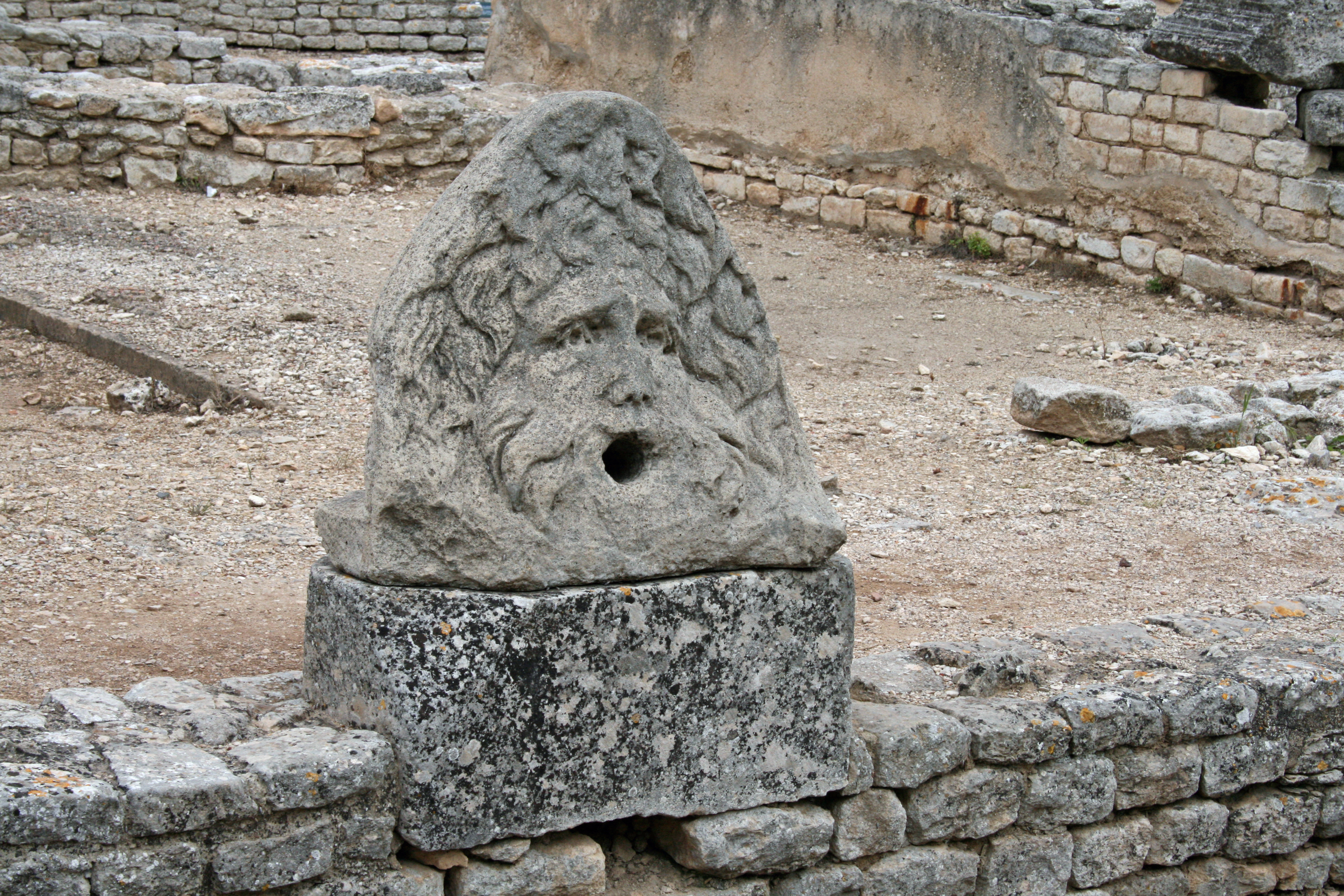 Glanum